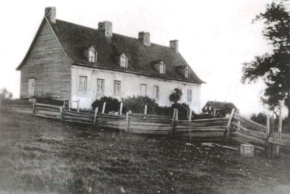 Maison Lebel-Langlais, 376, rang du Cap, Kamouraska « Cette vaste résidence de pierre, à quatre cheminées, fut érigée vers 1754-1755 par Jean Le Bel. Elle fut incendiée en 1759, lors de l'attaque de la Nouvelle-France par l'armée anglaise. Elle fut reconstruite en 1760. »